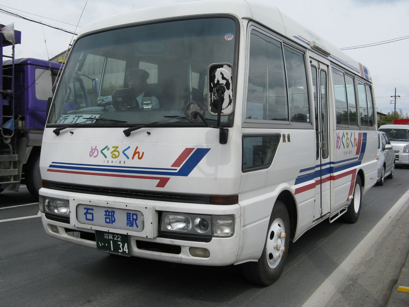 湖南市コミュニティバス 「めぐるくん」の車体だが、近江台へ行くのは「ふれあい号」菩提寺線のため、同線への流用と思われる